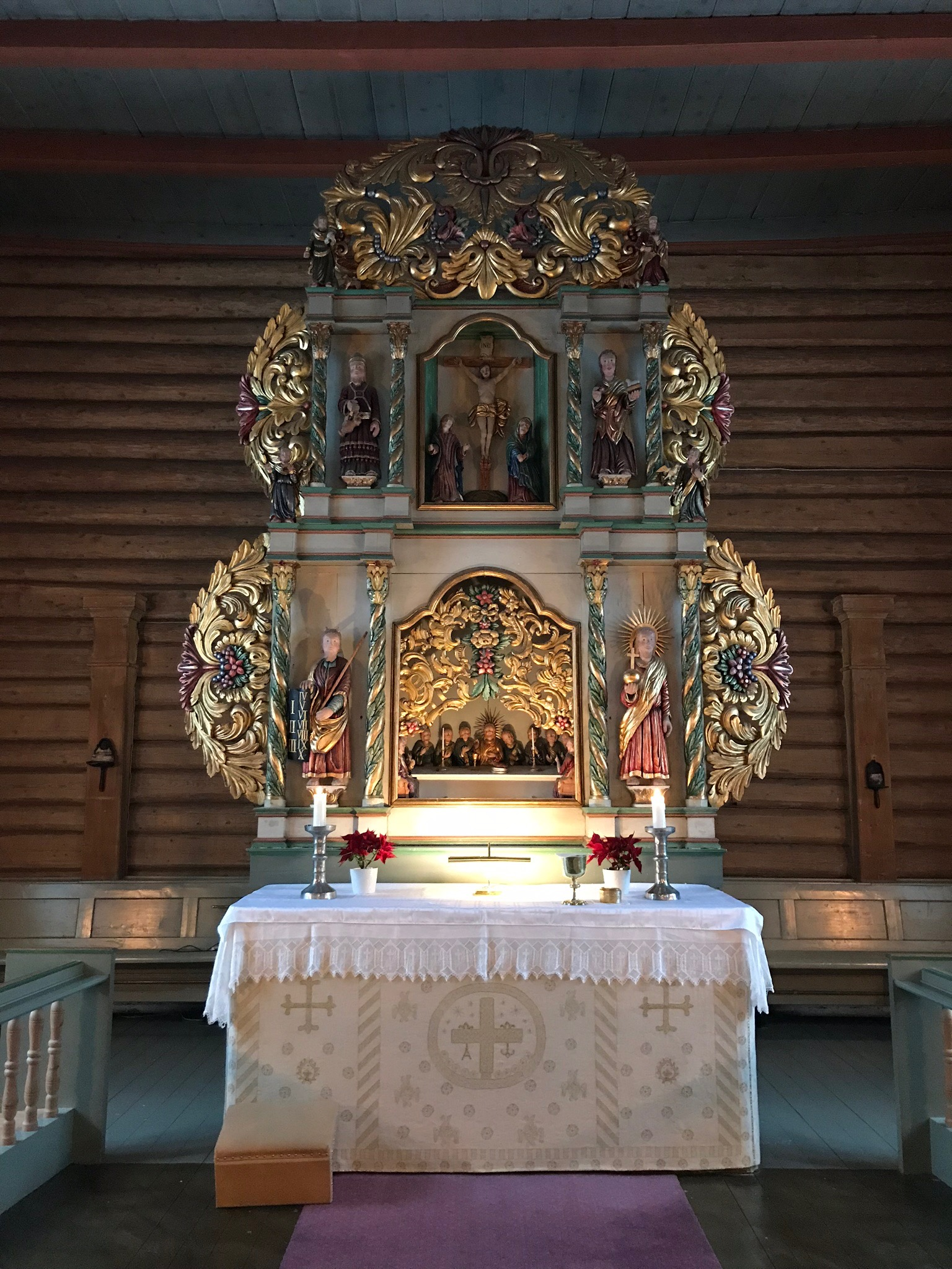 Altertavlen i Biri kirke, akantusutskjæringer, nattverden